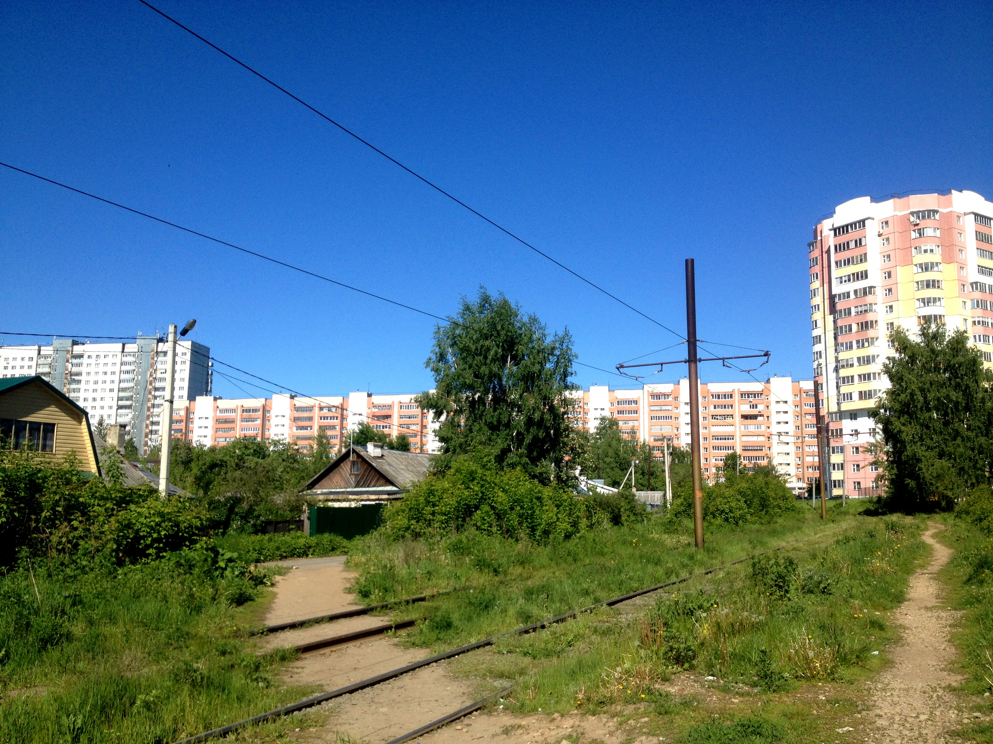 Улица Трамвайная в городе Казани (от пересечения с улицей Побежимова до пересечения с улицей Годовикова).